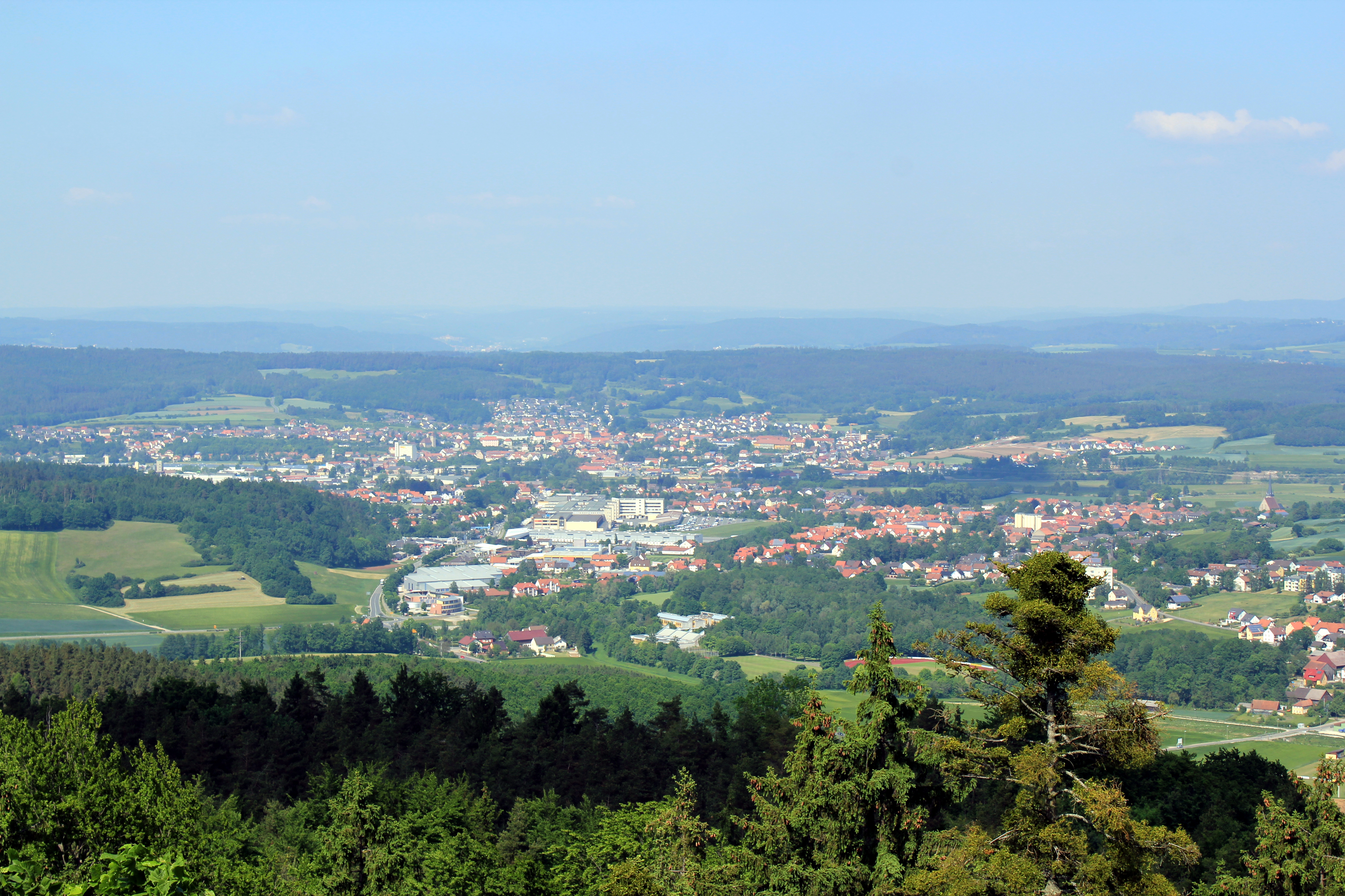 Blick über Burg- und Altenkunstadt vom Kordigast aus